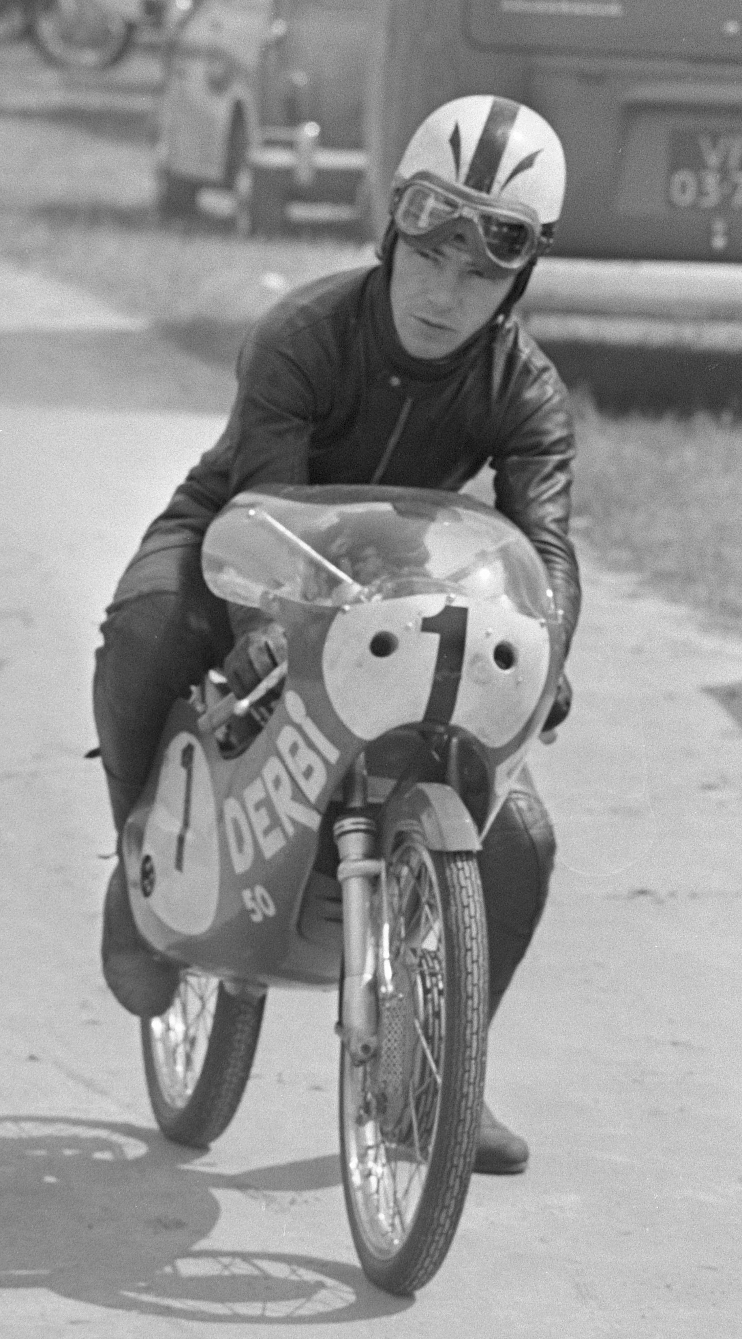 Ángel Nieto con la Derbi 50cc en Assen, 1970